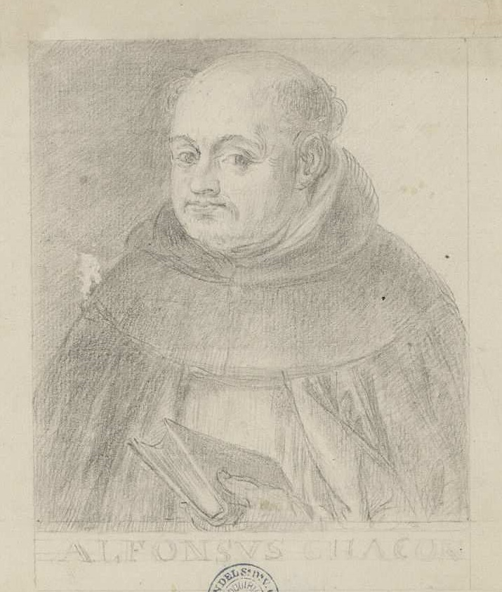 Retrato de fray Alfonso Chacón. Dibujo a lápiz sobre papel amarillento verjurado atribuido a Valentín Carderera. Biblioteca Nacional de España